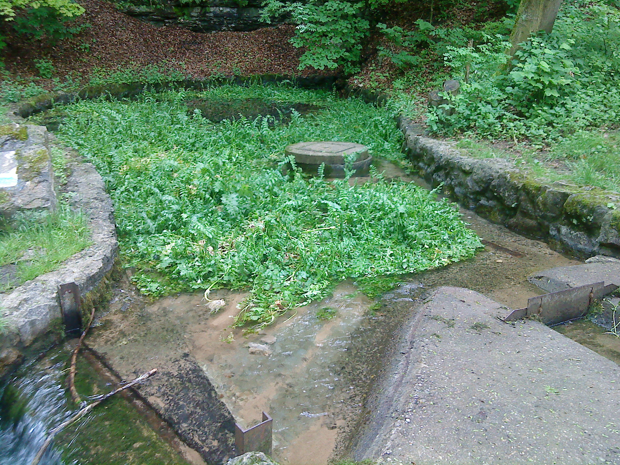 Der Grüntopf bei Kipfenberg